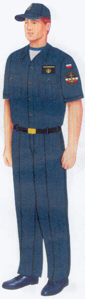 Rysunek ten pochodzi z załącznika do rozporządzenia ministra obrony narodowej z dnia 2 grudnia 2004 r. w sprawie wzorów oraz noszenia umundurowania i oznak wojskowych przez żołnierzy zawodowych i kandydatów na żołnierzy zawodowych.